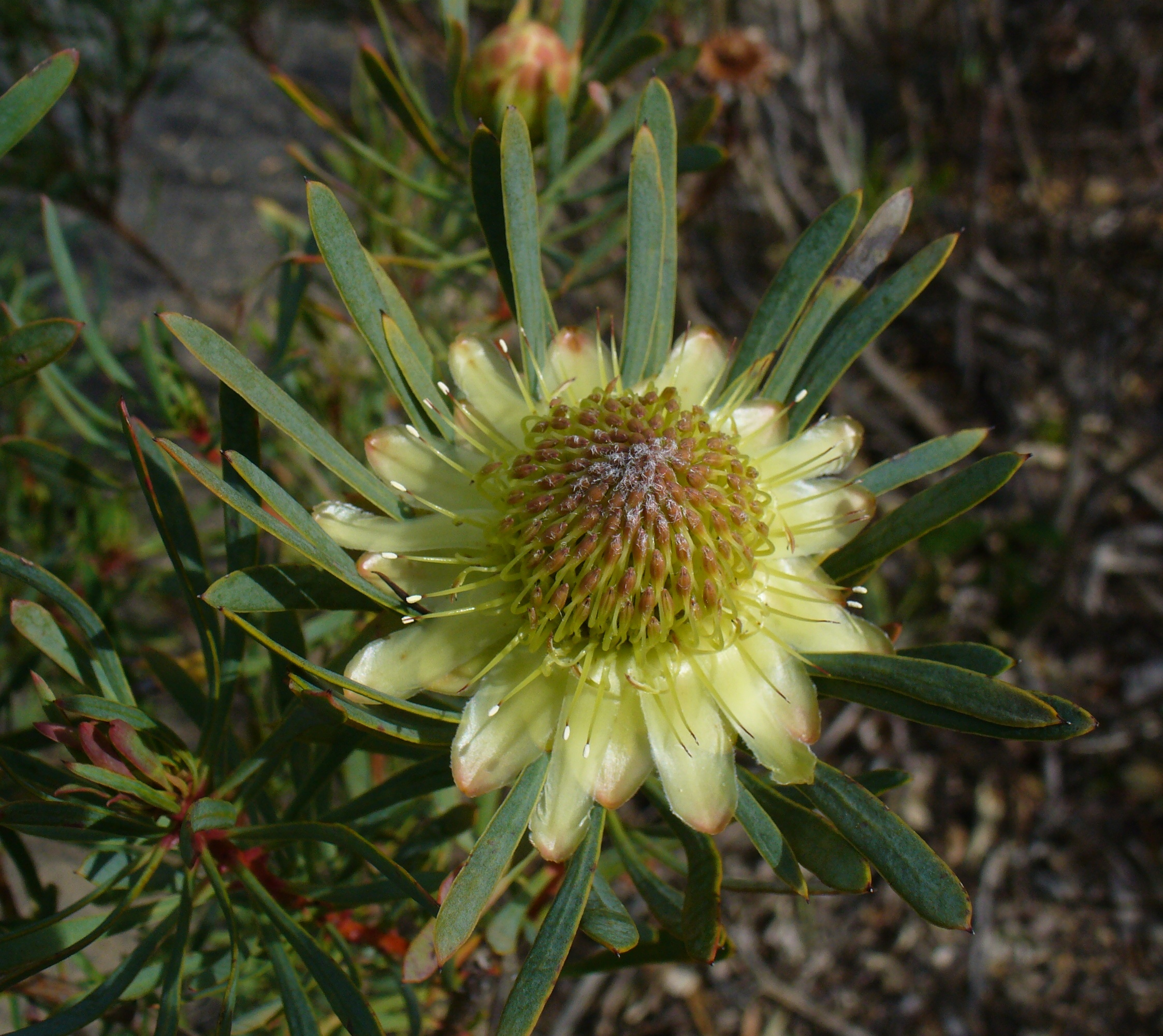 Kirstenbosch Gardens Cape Town